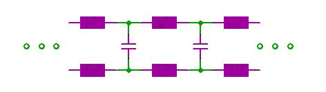 Ersatzschaltbild einer Leitung